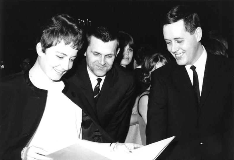 18.3.1966 Preis für "Darstellende Kunst" Junge Generation Berliner Schaubühne am Hallischen Ufer